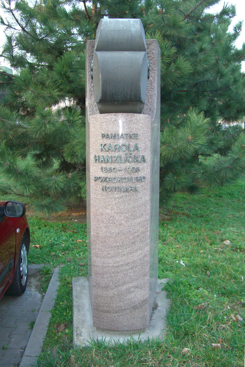 Pomnik Karola Hanzlicka - detail, Bratislava/Ruzinov/Posen